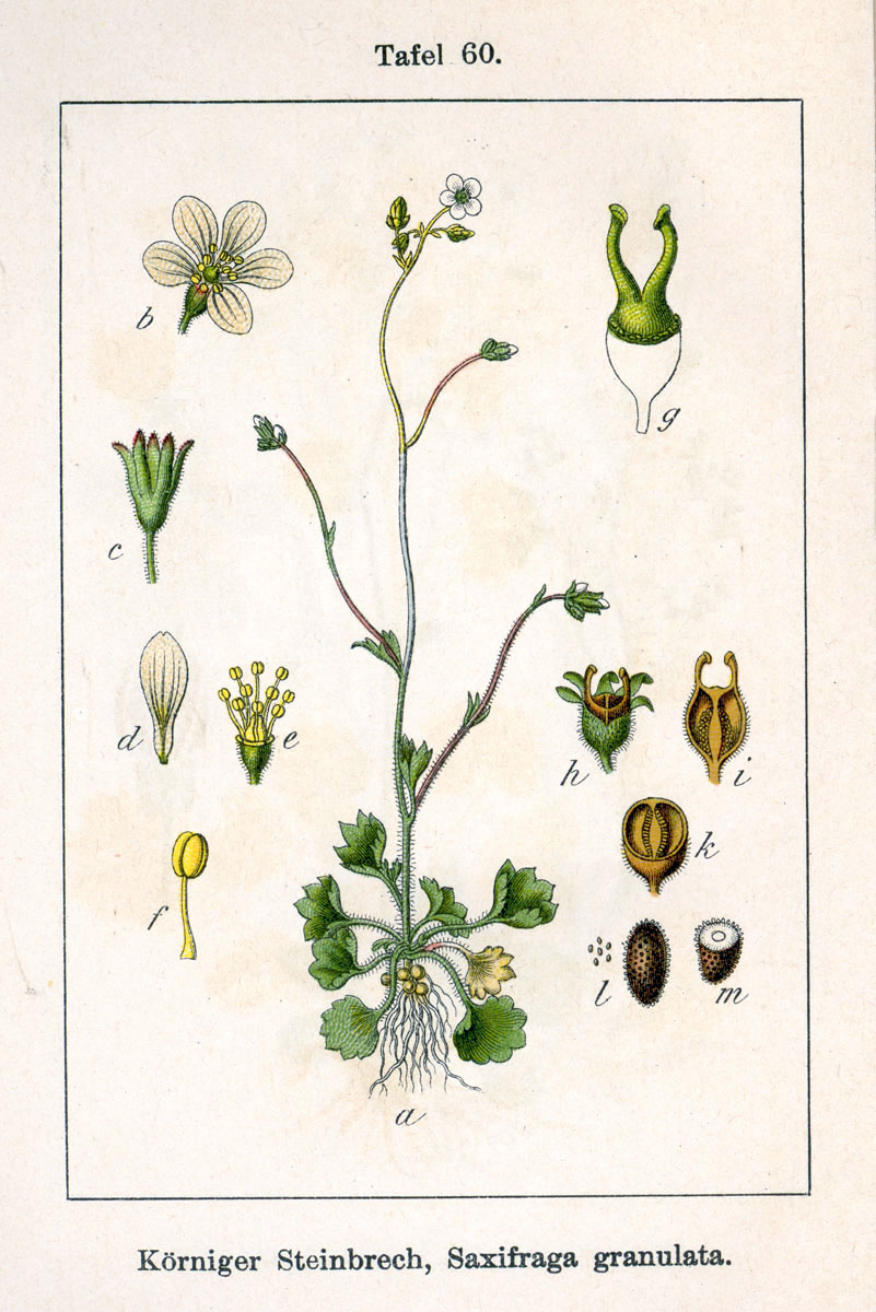 Saxifraga granulata L. Original Description Körniger Steinbrech, Saxifraga granulata